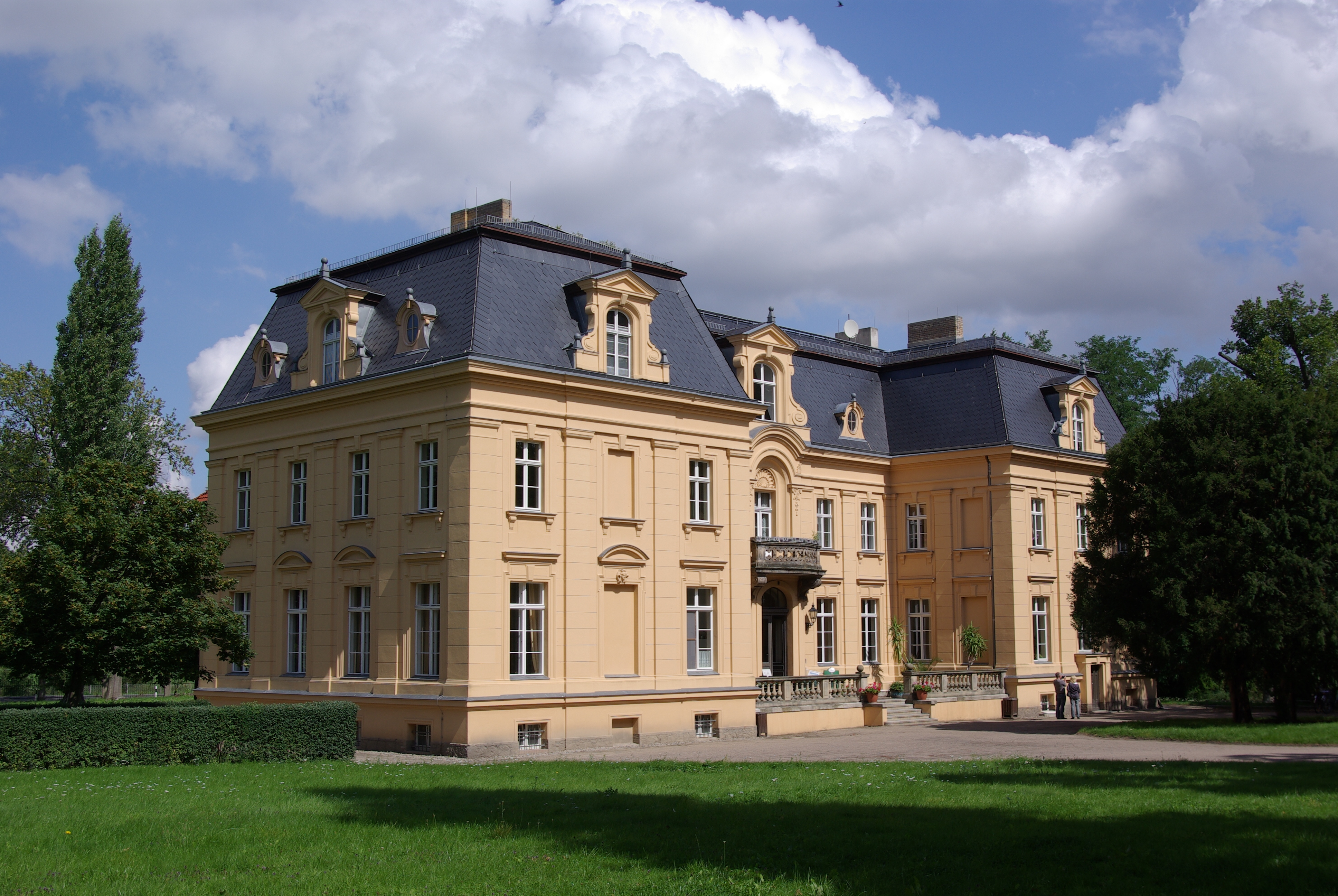 Bad Freienwalde (Oder) Ortsteil Altranft. Das Schloss (Herrenhaus) ist Teil des Freilichtmuseums und steht unter Denkmalschutz.